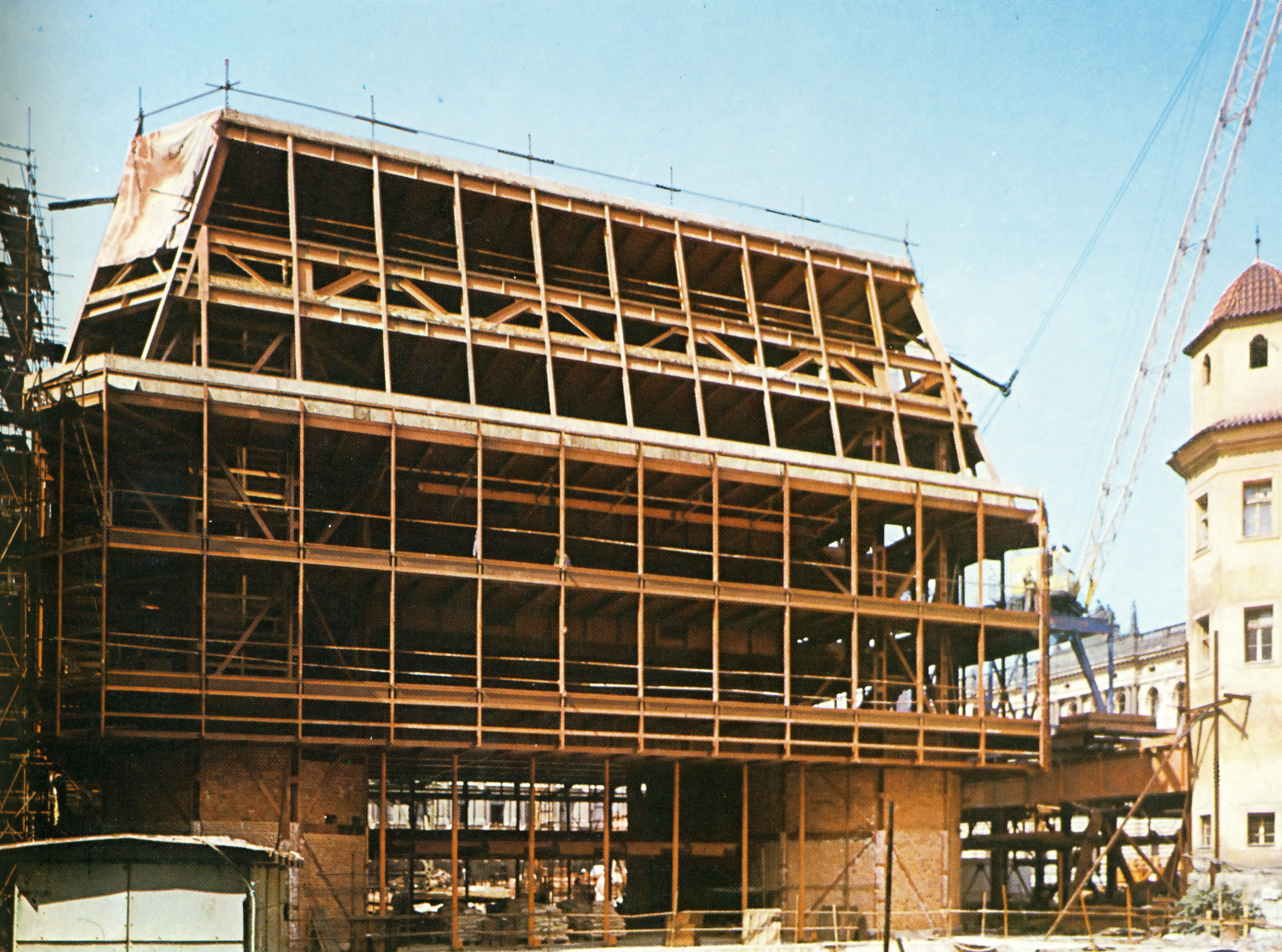 Nosná ocelová konstrukce budovy vyrobená v mostárně ve VŽKG v Ostravě v létech 1979-81.